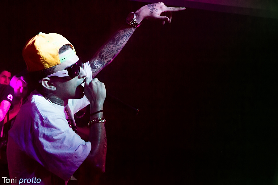 Mc Guimê